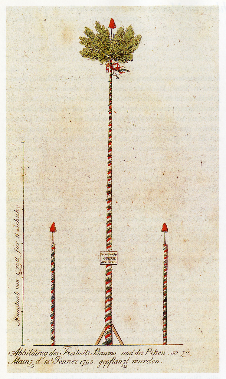 Zeitgenössische Abbildung des Mainzer Freiheitsbaums von Januar 1793